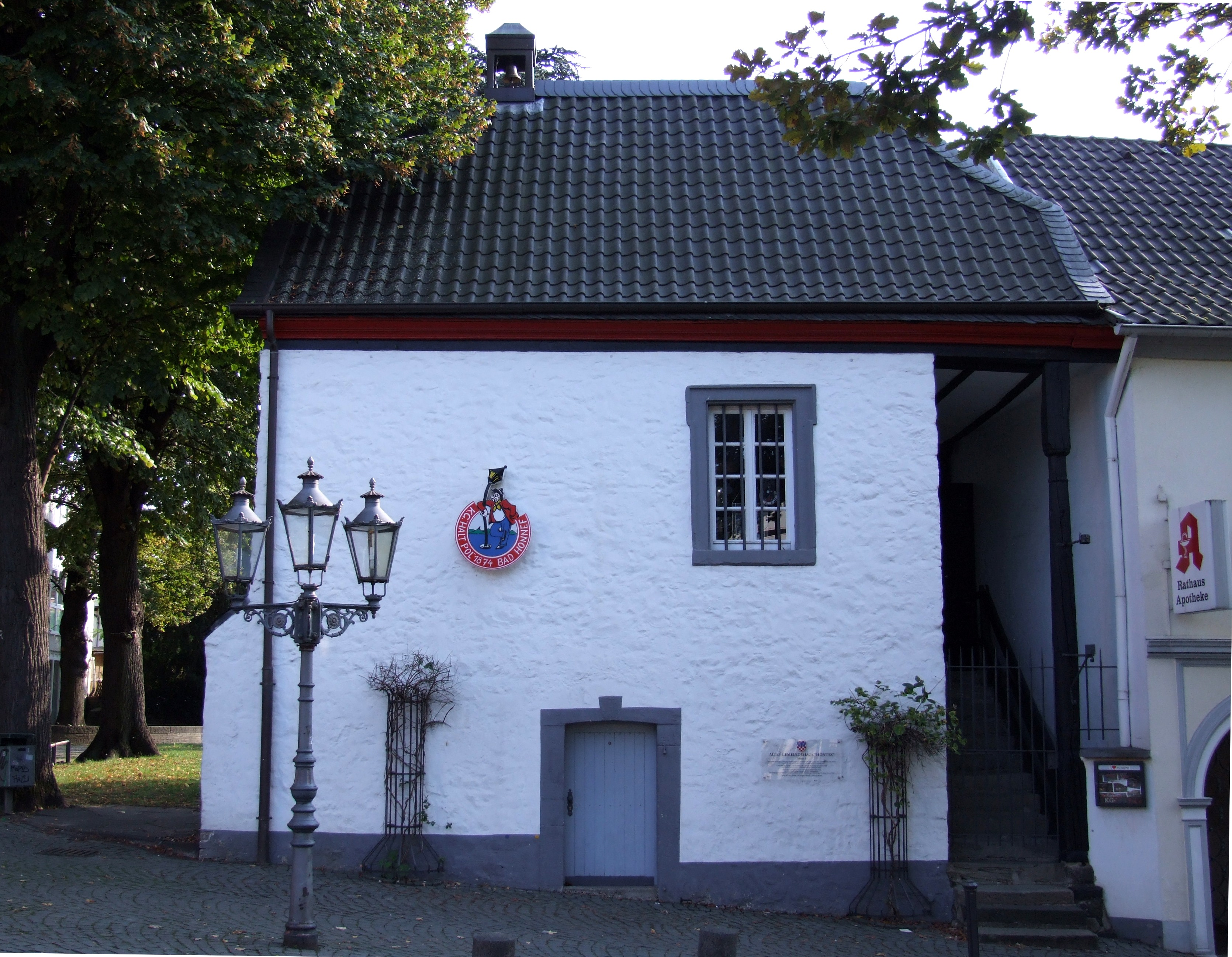 Hontes, ältestes ziviles Gebäude von Bad Honnef